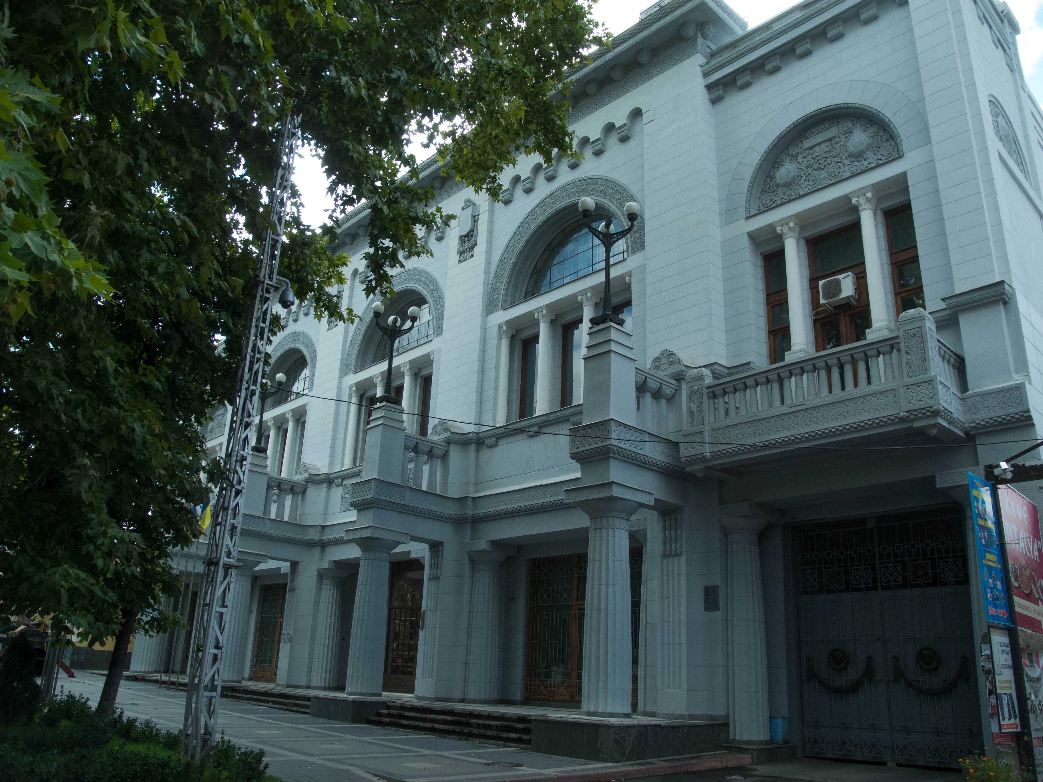 Будівля «Товариства Взаємного Кредиту», Сімферополь, вул. Горького, 4, літер «А», «Б»